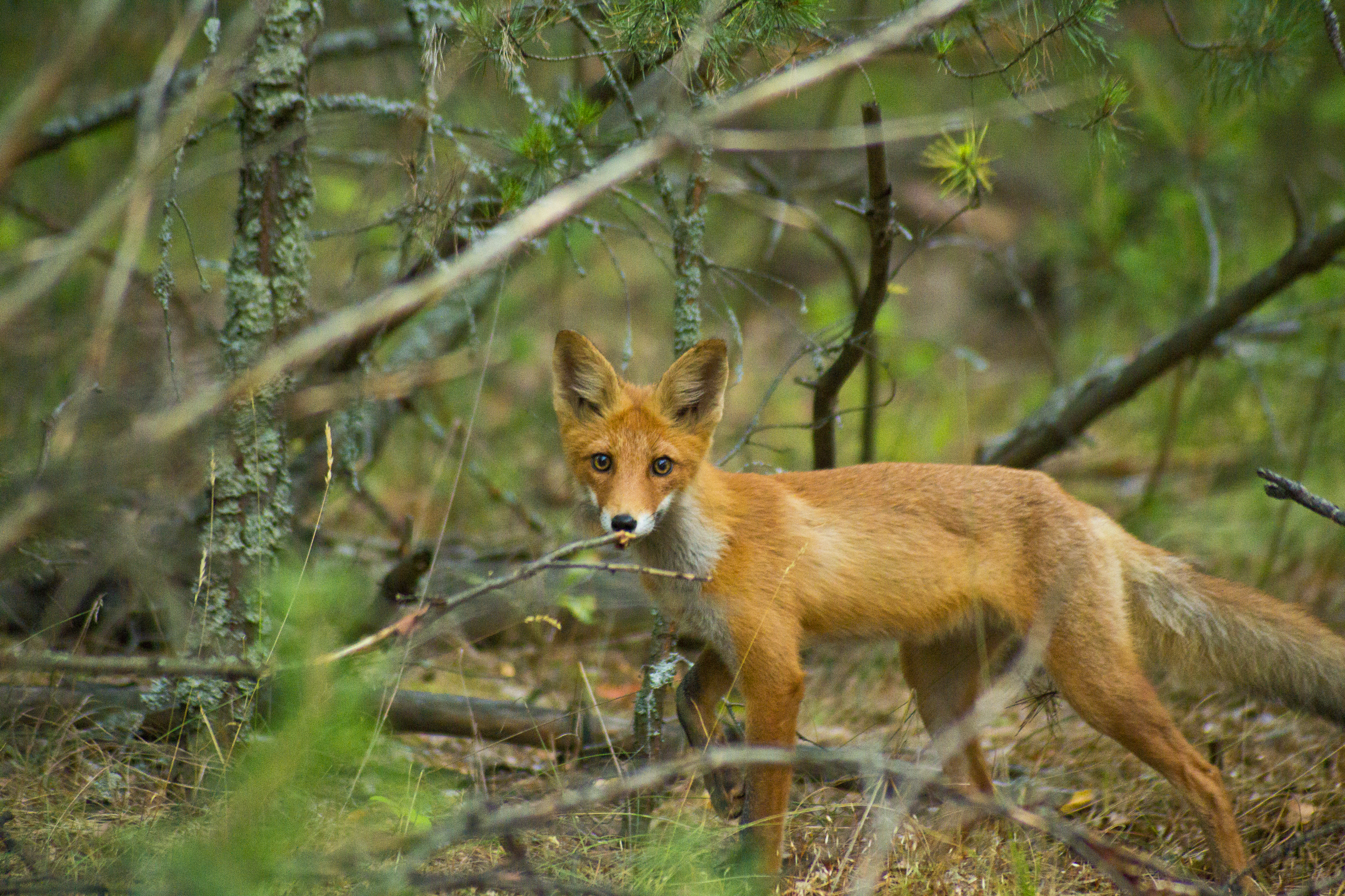 Міжрічинський , міжріччя Дніпра та Десна на території Козелецького та Чернігівського районів